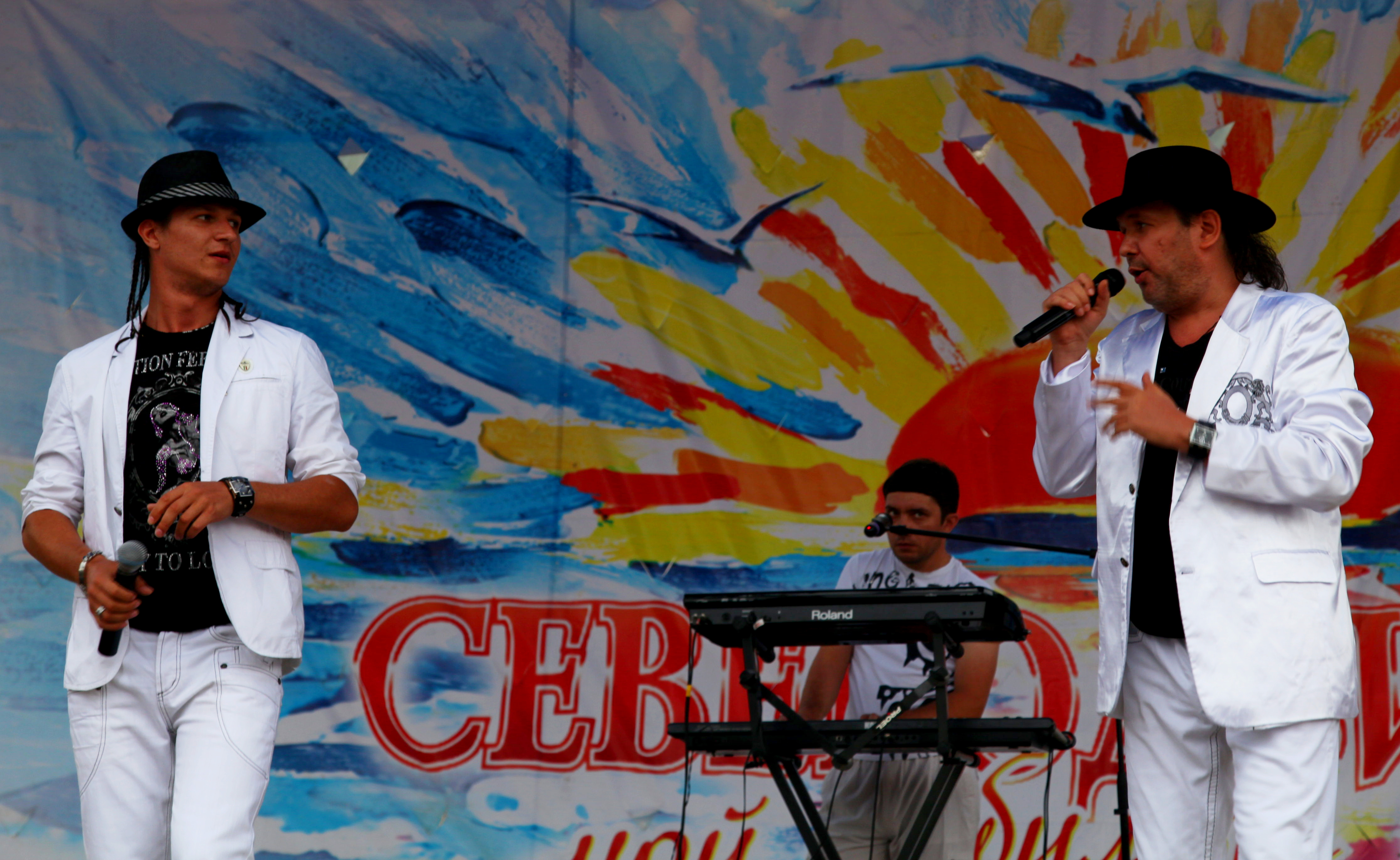 Группа Нэнси. Выступление на Дне города Северодвинска (29 июля 2012 года). Организатор — концертное агентство Северяночка.